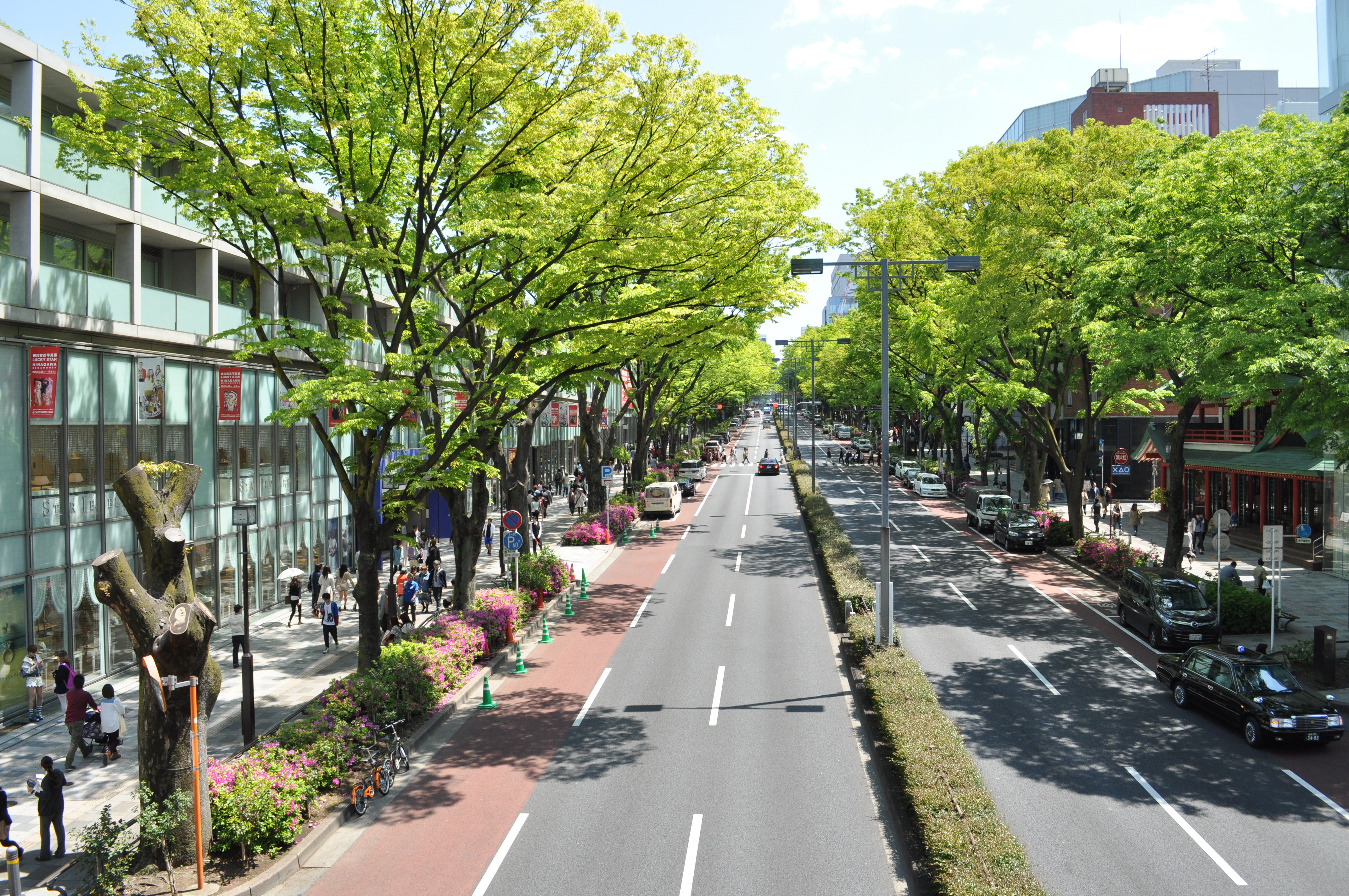 表参道ヒルズ周辺